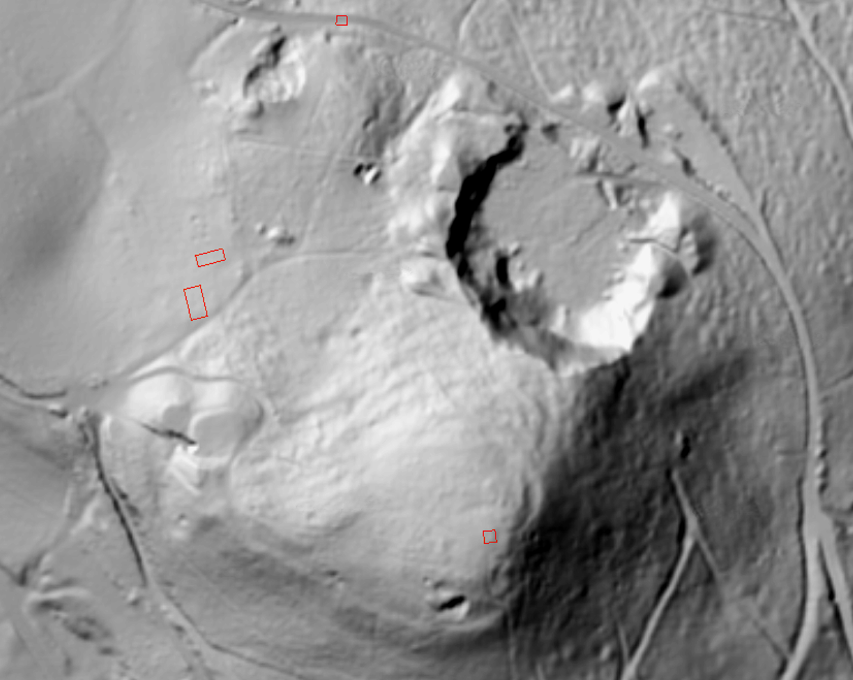 Gelände am Lethkogel, Stainz, Steiermark, Österreich: archäologische Fundstelle einer Siedlung aus der Keltenzeit